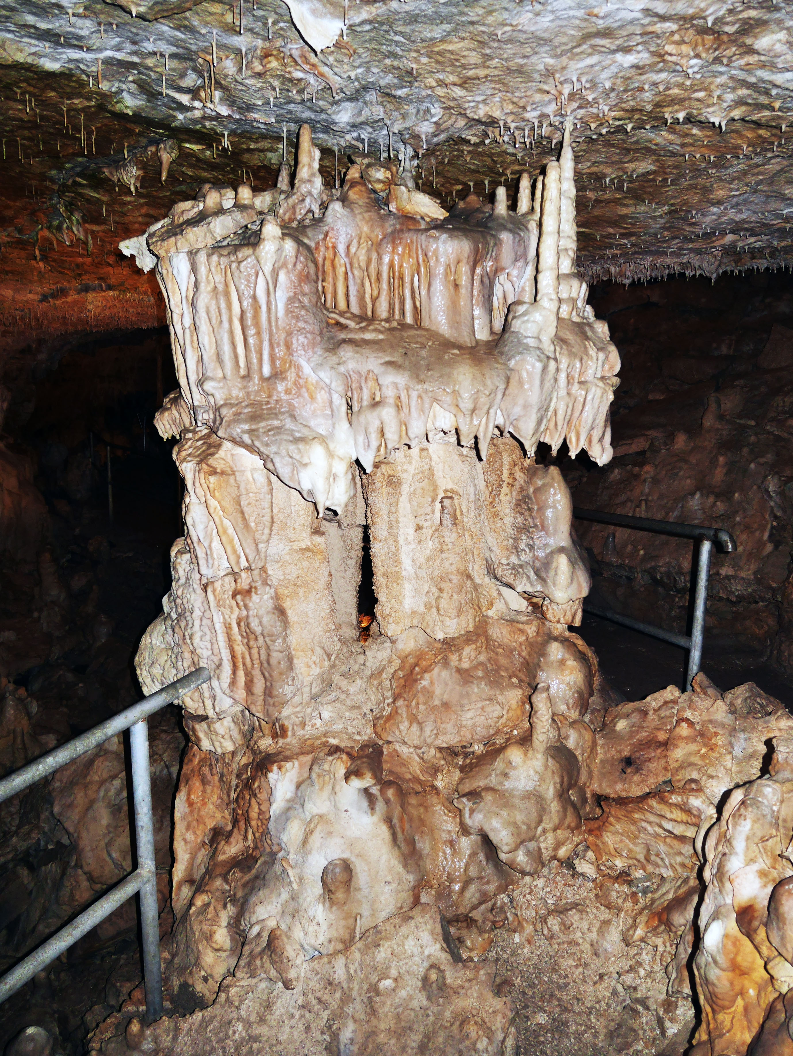 König-Otto-Tropfsteinhöhle